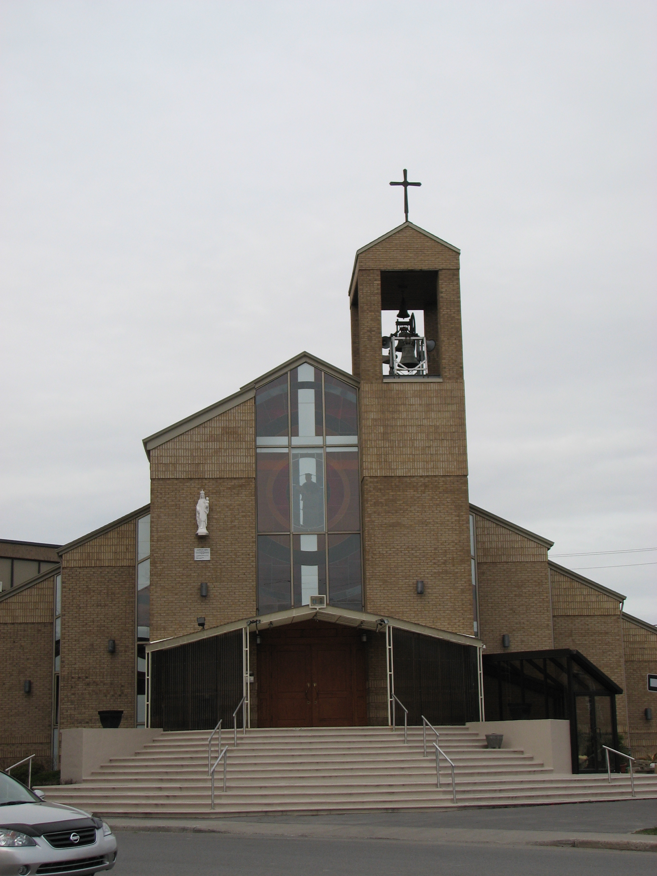 rotate